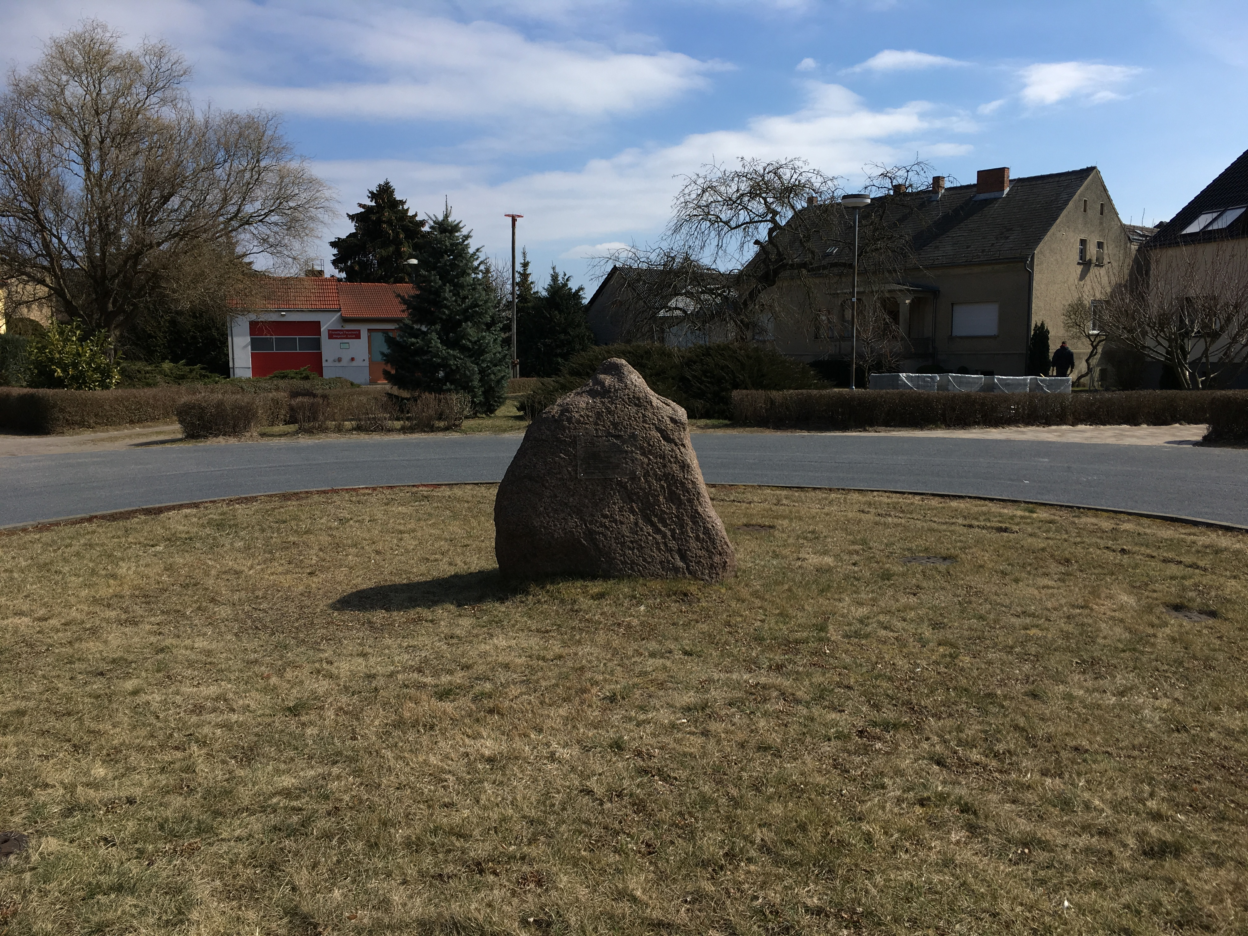 Mietgendorf, ein Ortsteil der Stadt Ludwigsfelde in Brandenburg